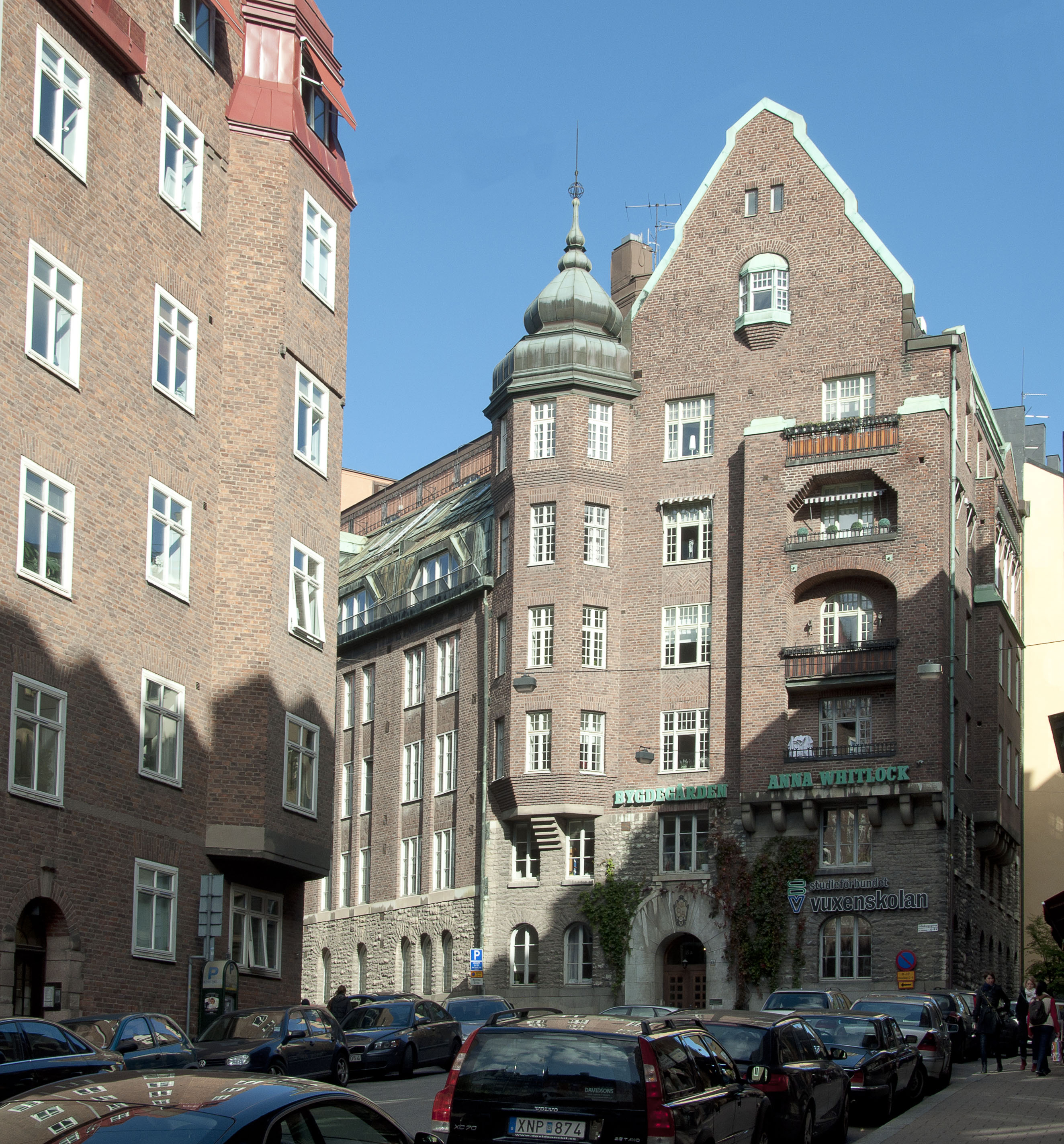 Whitlockska samskolan, Eriksbergsgatan 8A